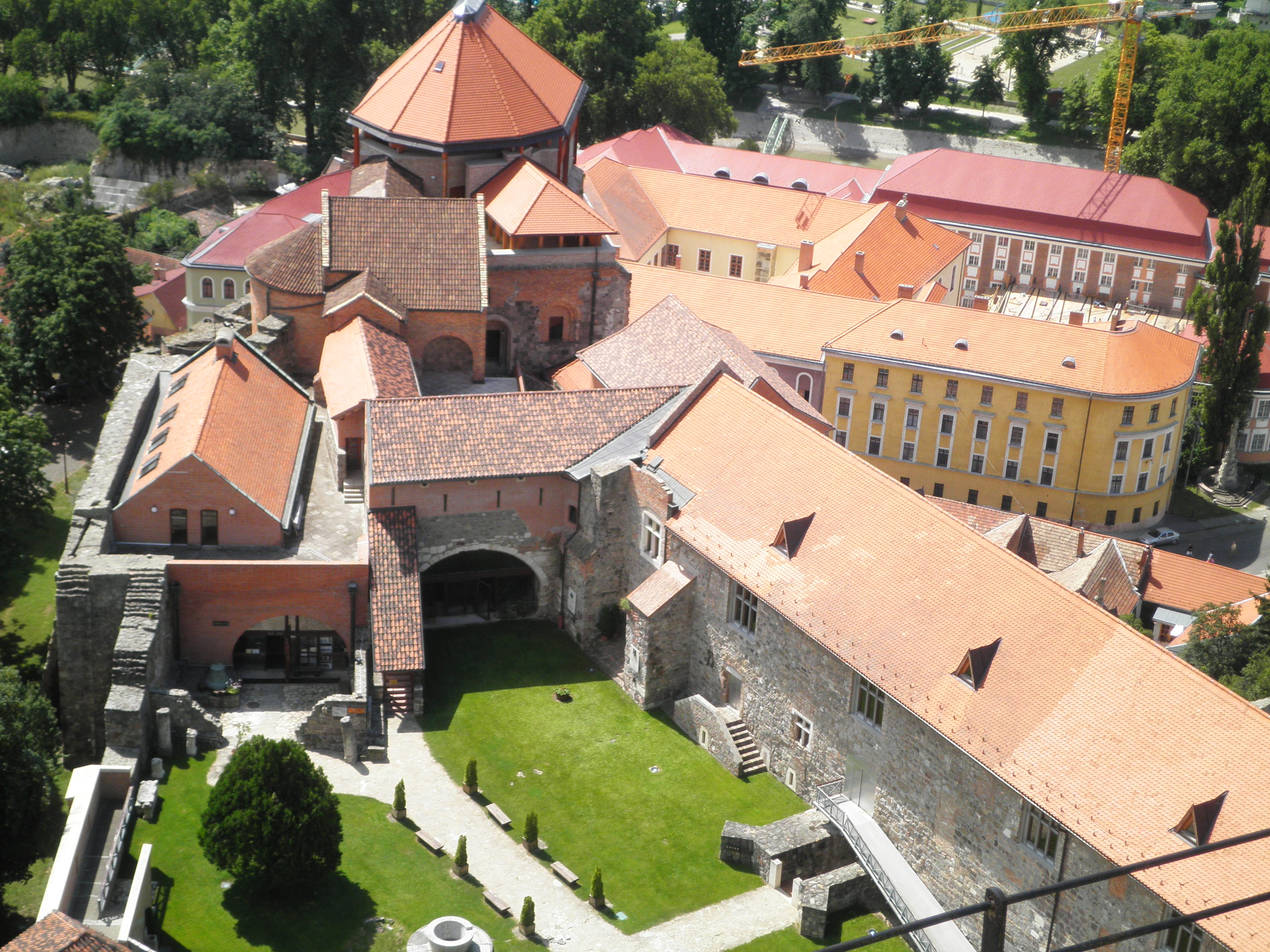 vár, a királyi, majd érseki palota maradványainak együttese This is a photo of a monument in Hungary. Identifier: 91100